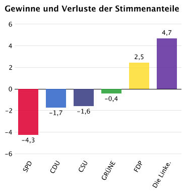 Bundestagswahlen 2005 PD: § 5 UrhG